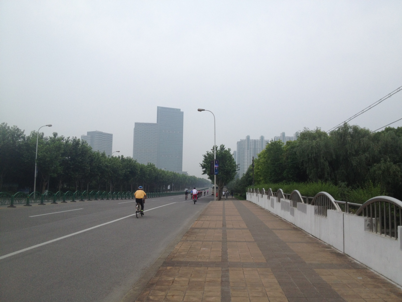 上海芳甸路2013-6-13